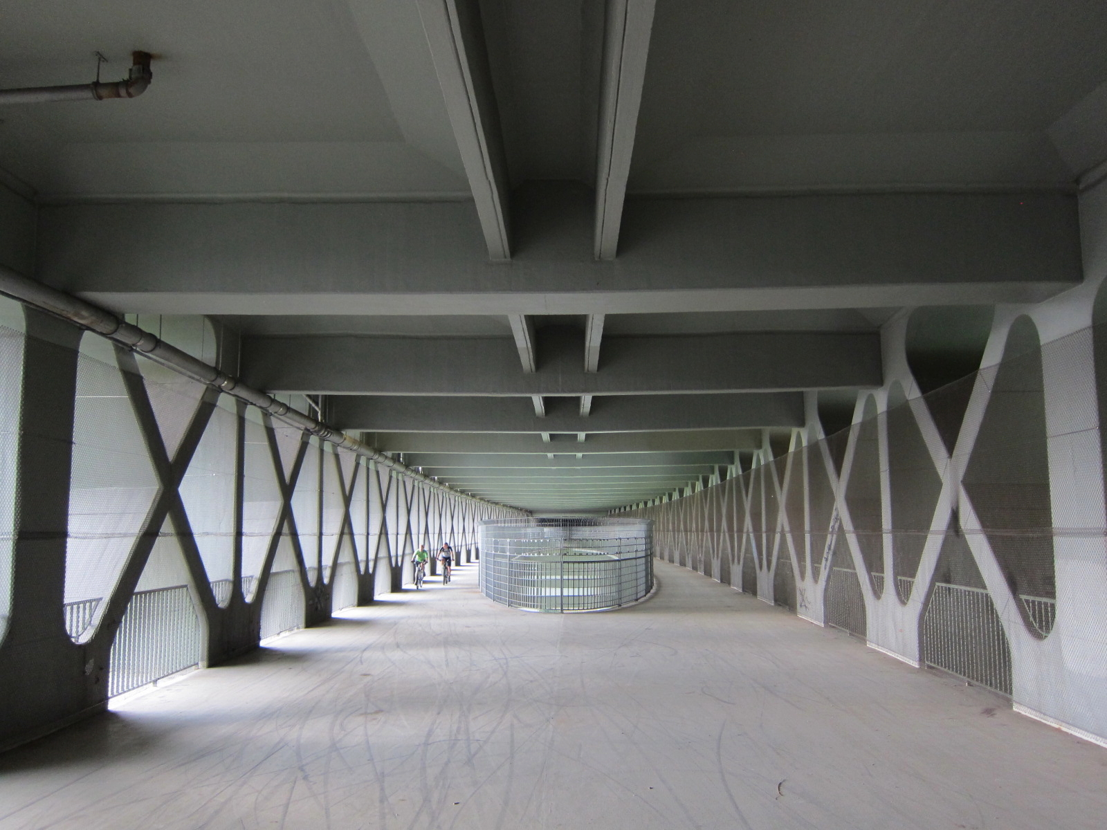 Mangfallbrücke, Inneres der alten Brücke